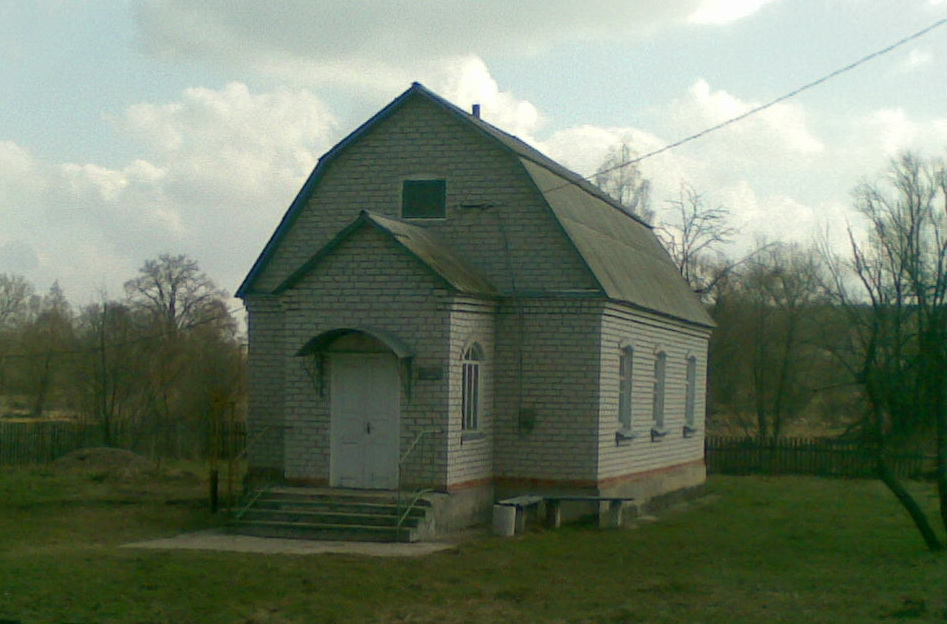 Молільний_будинок_с.Сингаї_Коростенського_району